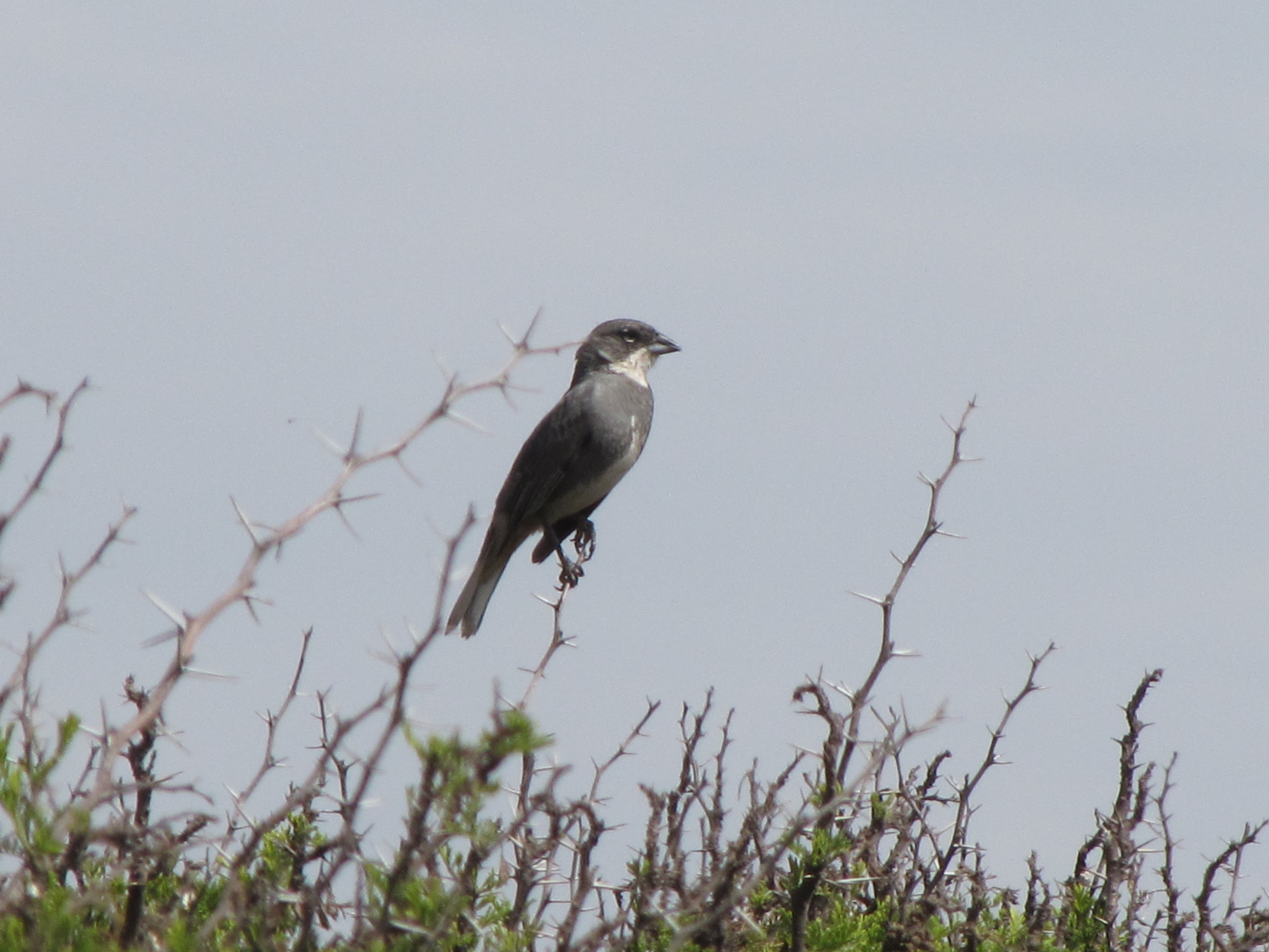 Diuca común (Diuca diuca)